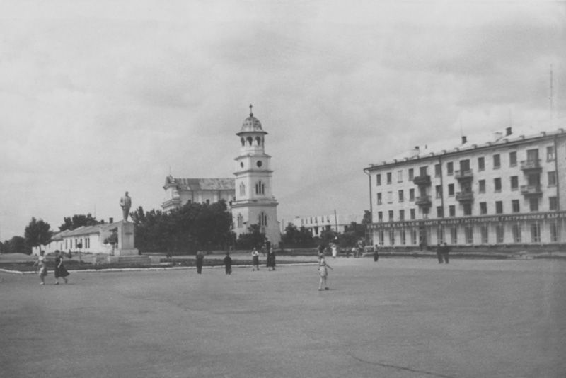 Piaţa Independenţei din Bălţi în perioada postbelică